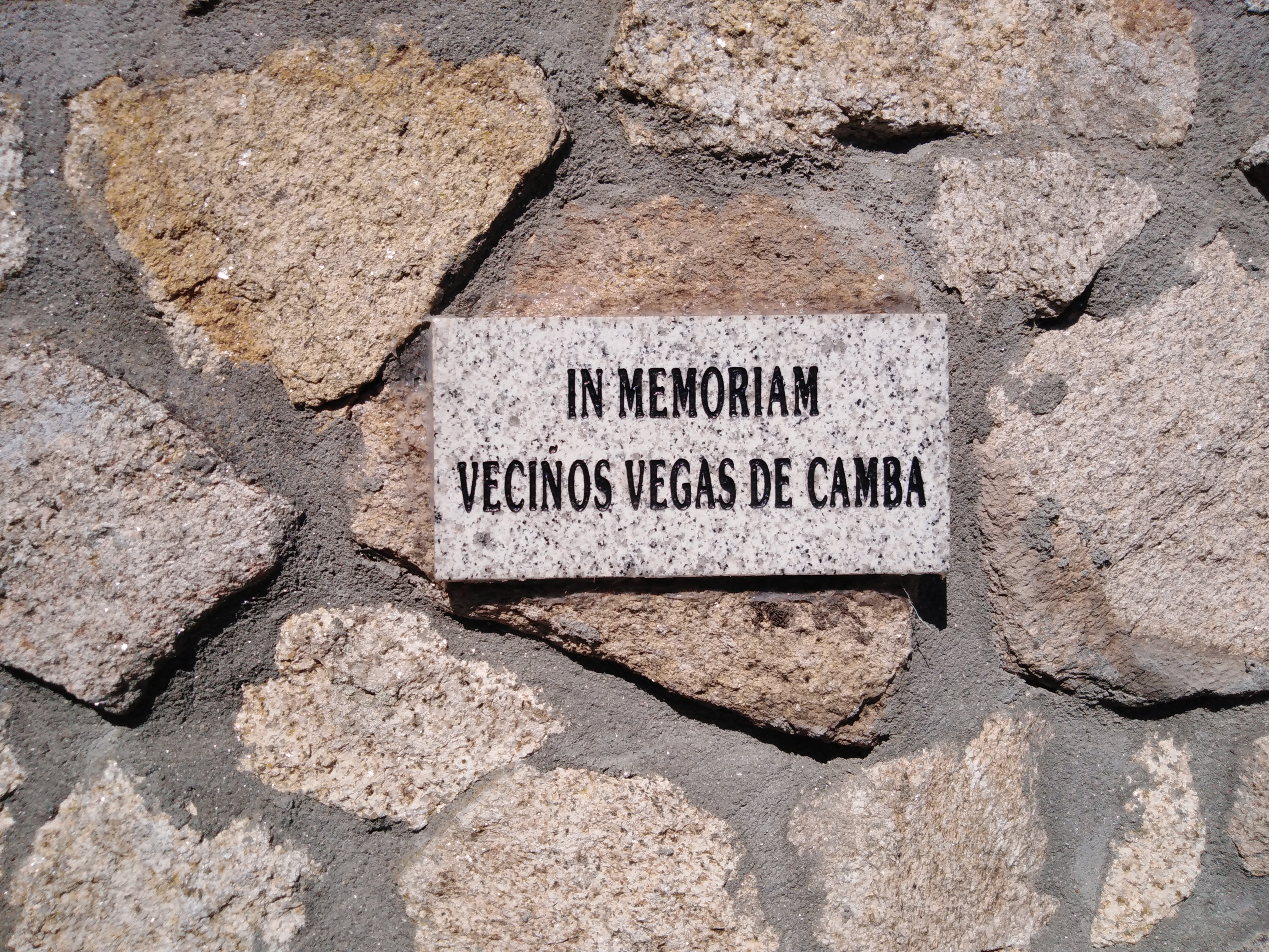 Placa en lembranza dos habitantes de Veigas de Camba no cemiterio da Venda da Capela